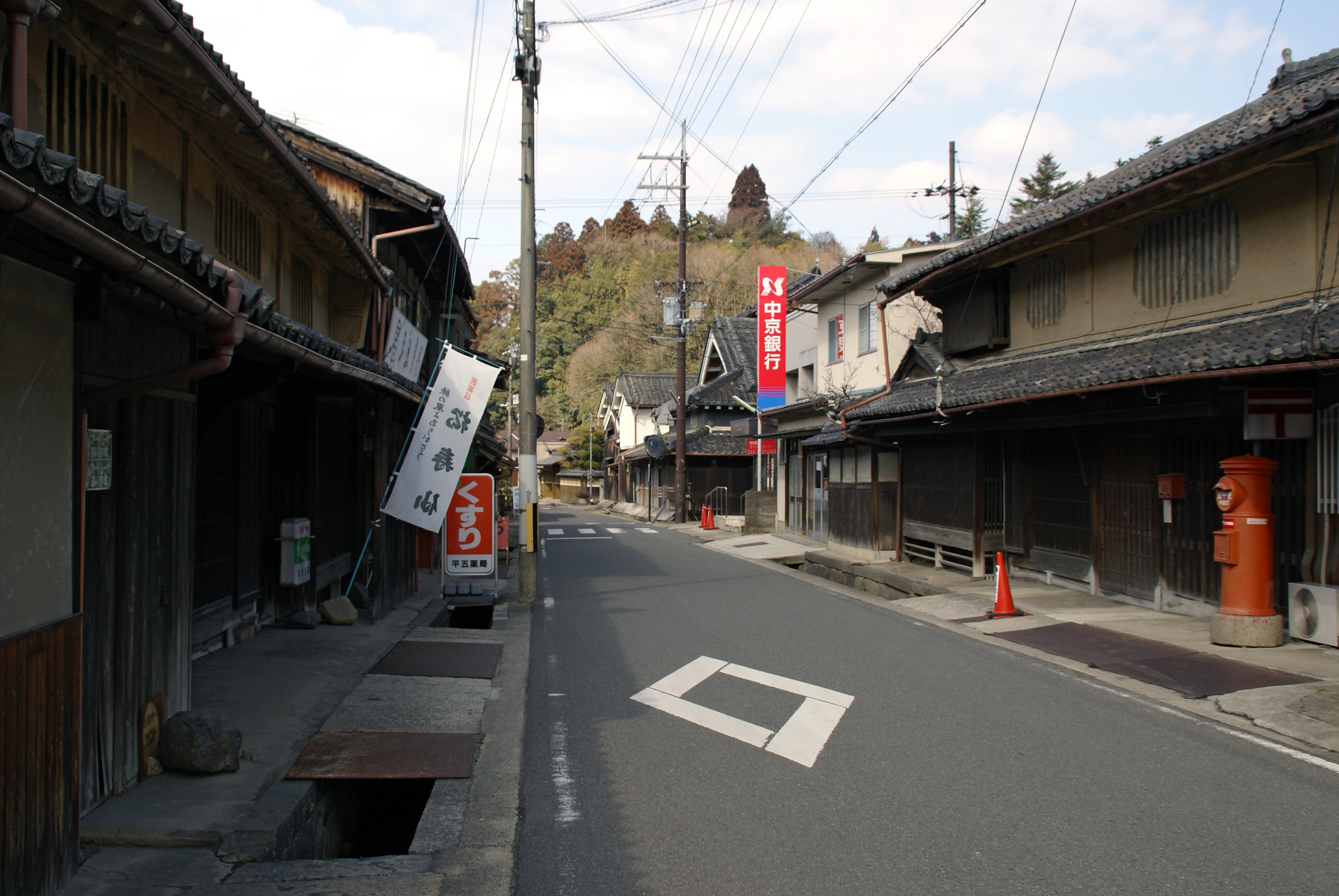 Matsuyama in Uda, Nara prefecture, Japan